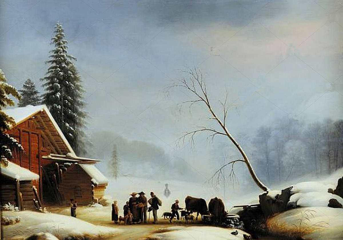 Paesaggio, olio su tela, 58 x 82 cm, collezione privata